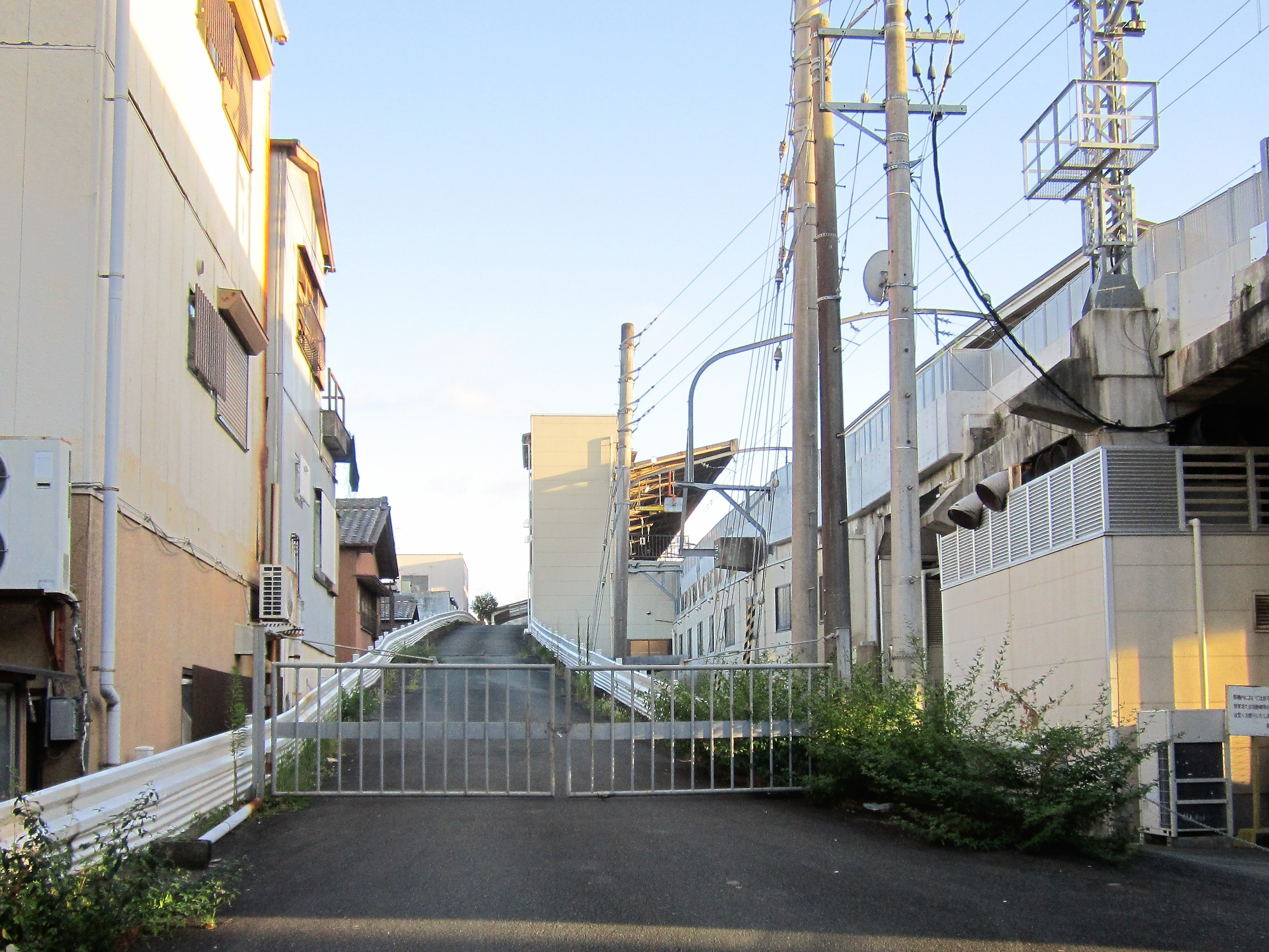 宇治山田駅のホームに直結するバス乗り場跡へ向かうスロープ